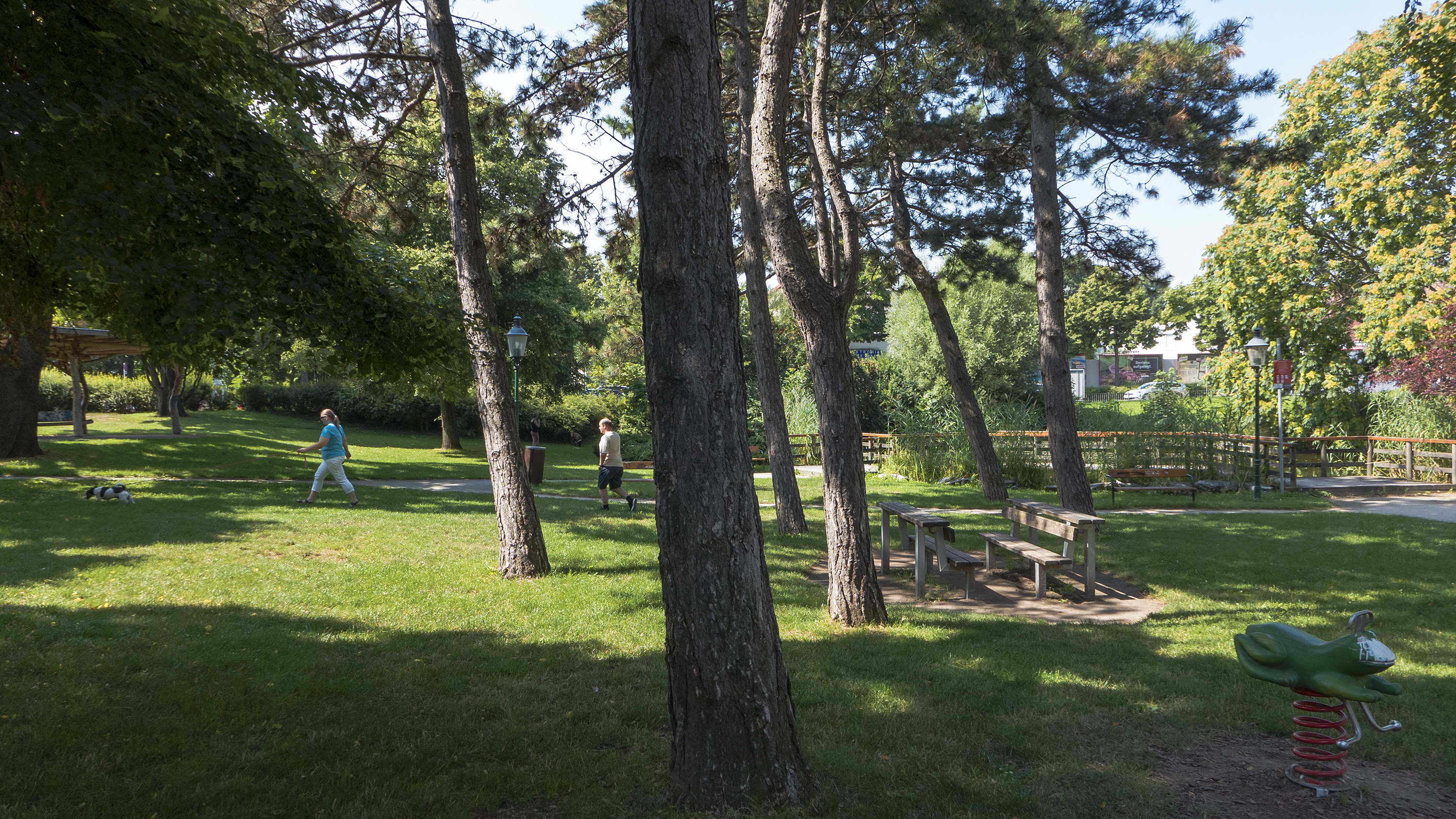 Bill-Grah-Park in Wien 22